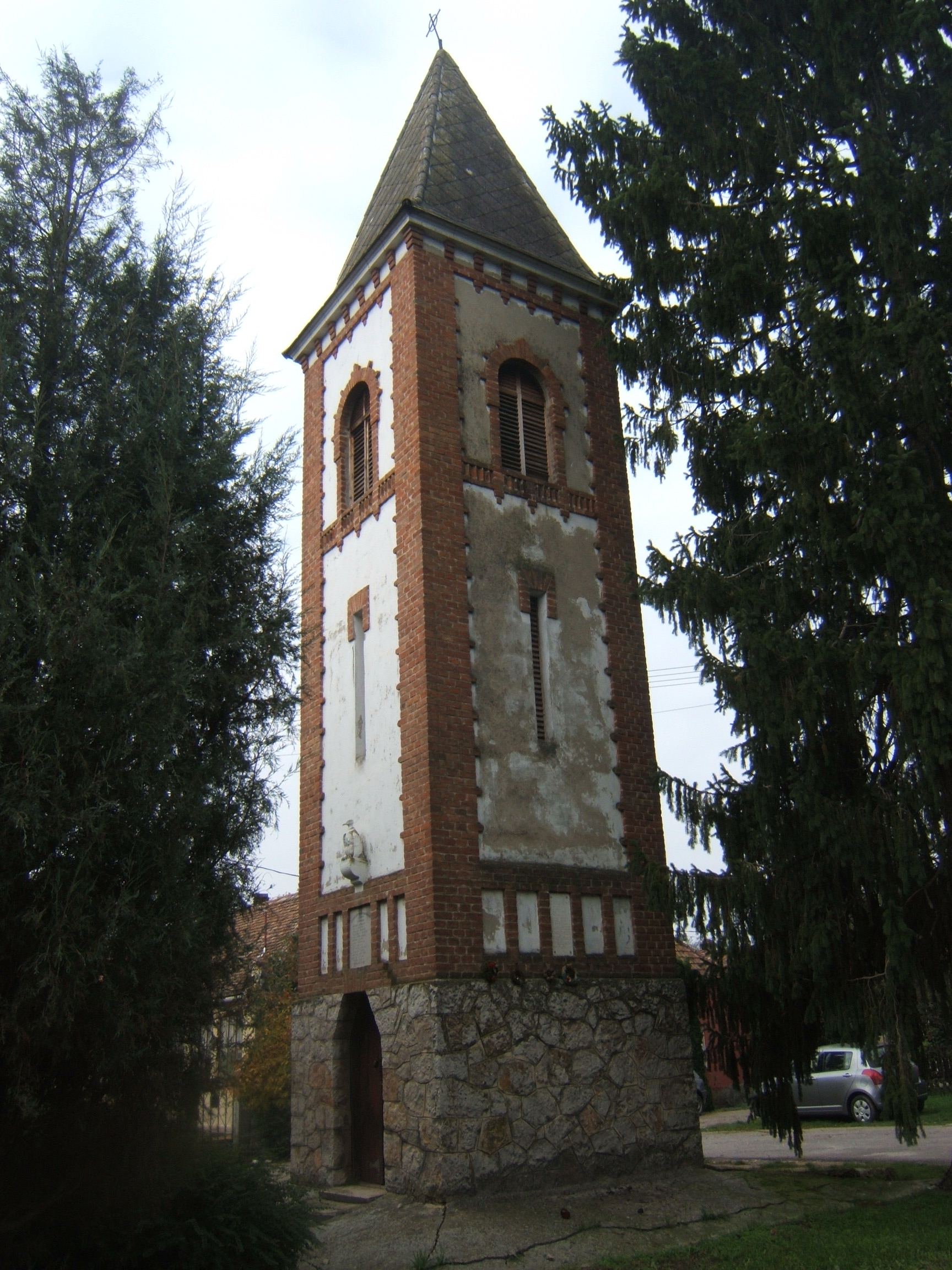 Kisdéri harangtorony